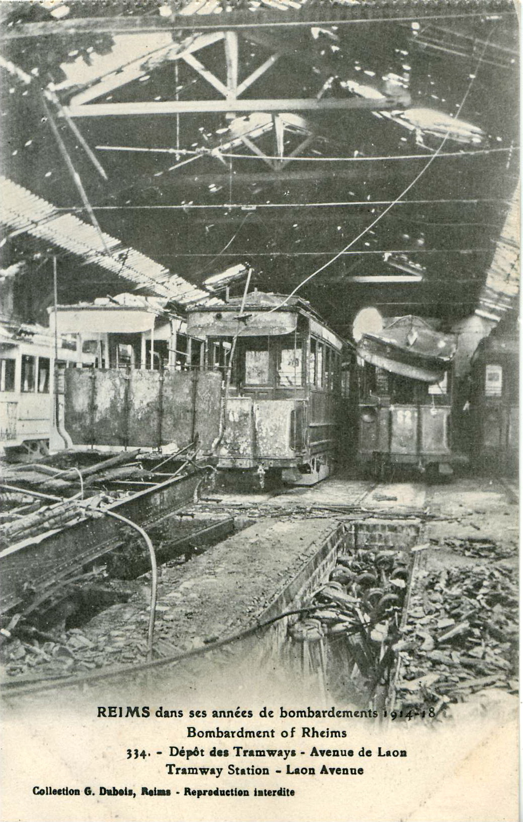 Carte postale ancienne éditée par G. Dubois à Reims, n°334 : Reims dans ses années de bombardement 1914-1918 - Dépôt des Tramways - avenue de Laon